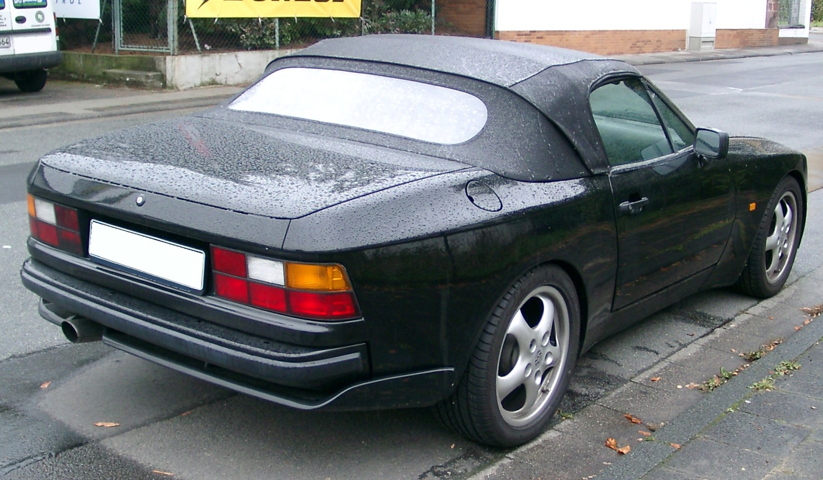 Porsche 944 Cabriolet